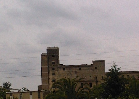 L'ex convento di Sant'Antonio Abate a Cisterna di Latina